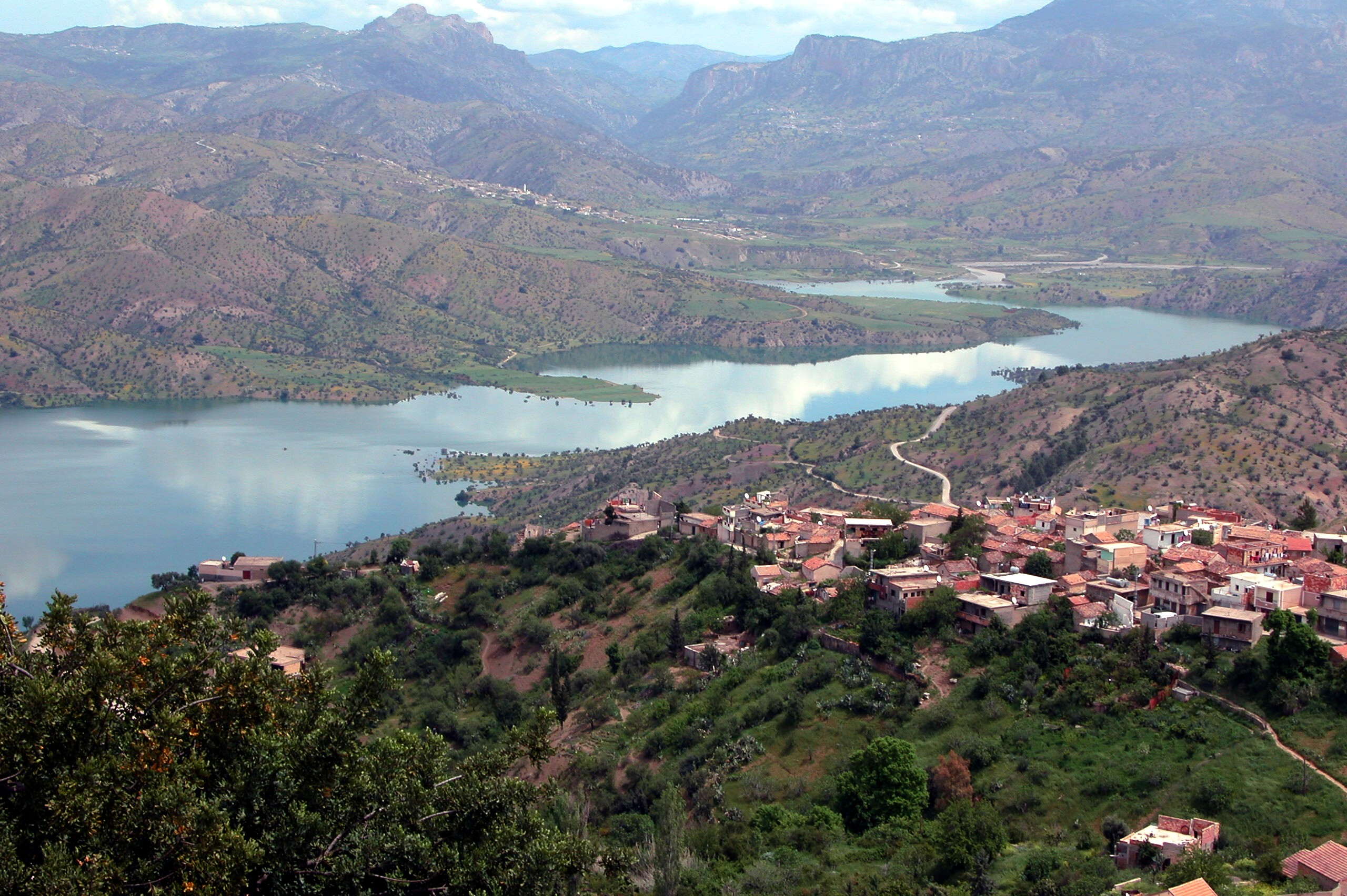 Tamokra kan